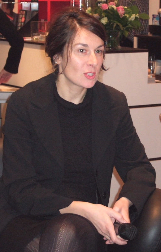 Zsuzsa Bánk Aufnahme: 6.10.2006 Url